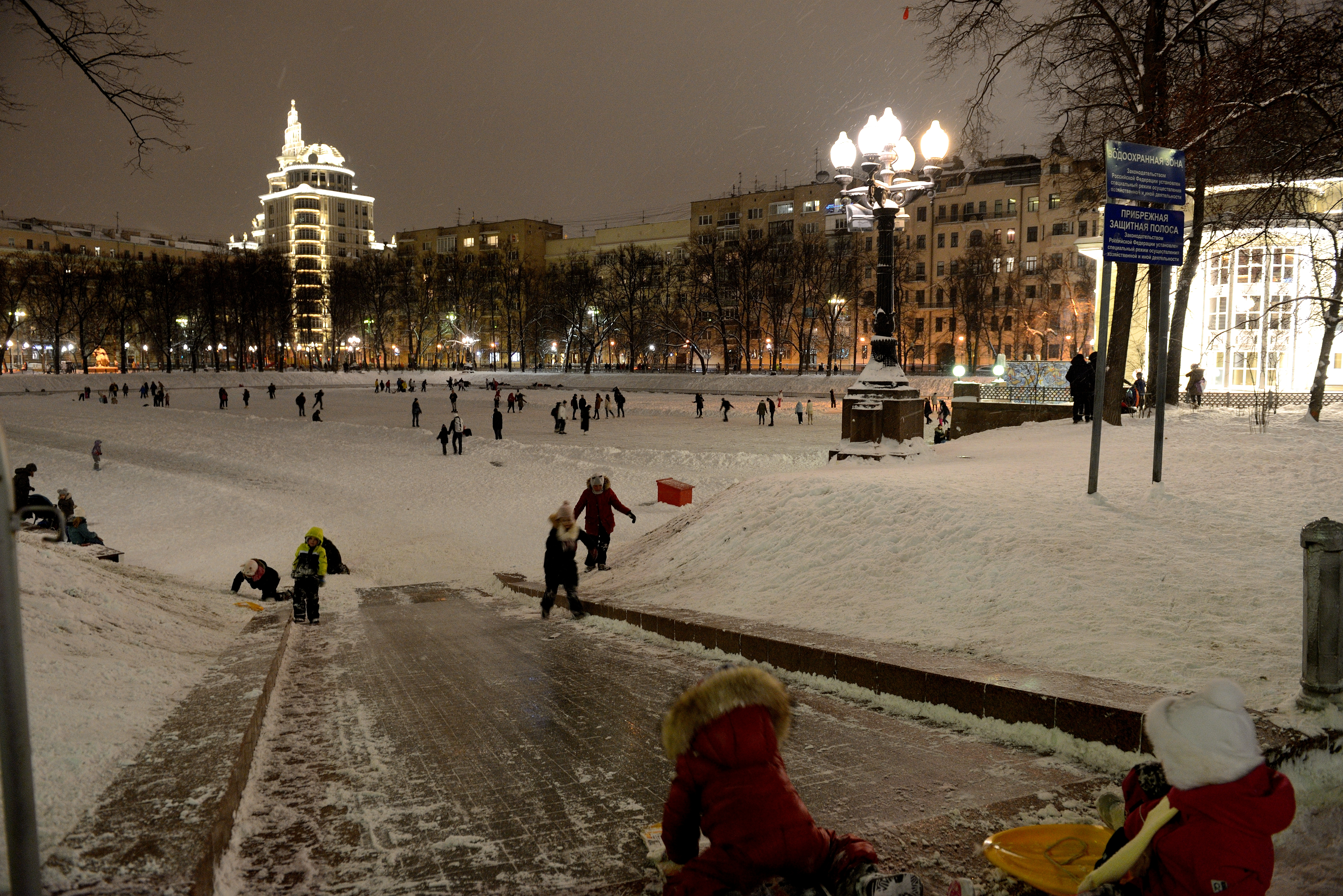 Патриаршии пруды, горка, январь 2018